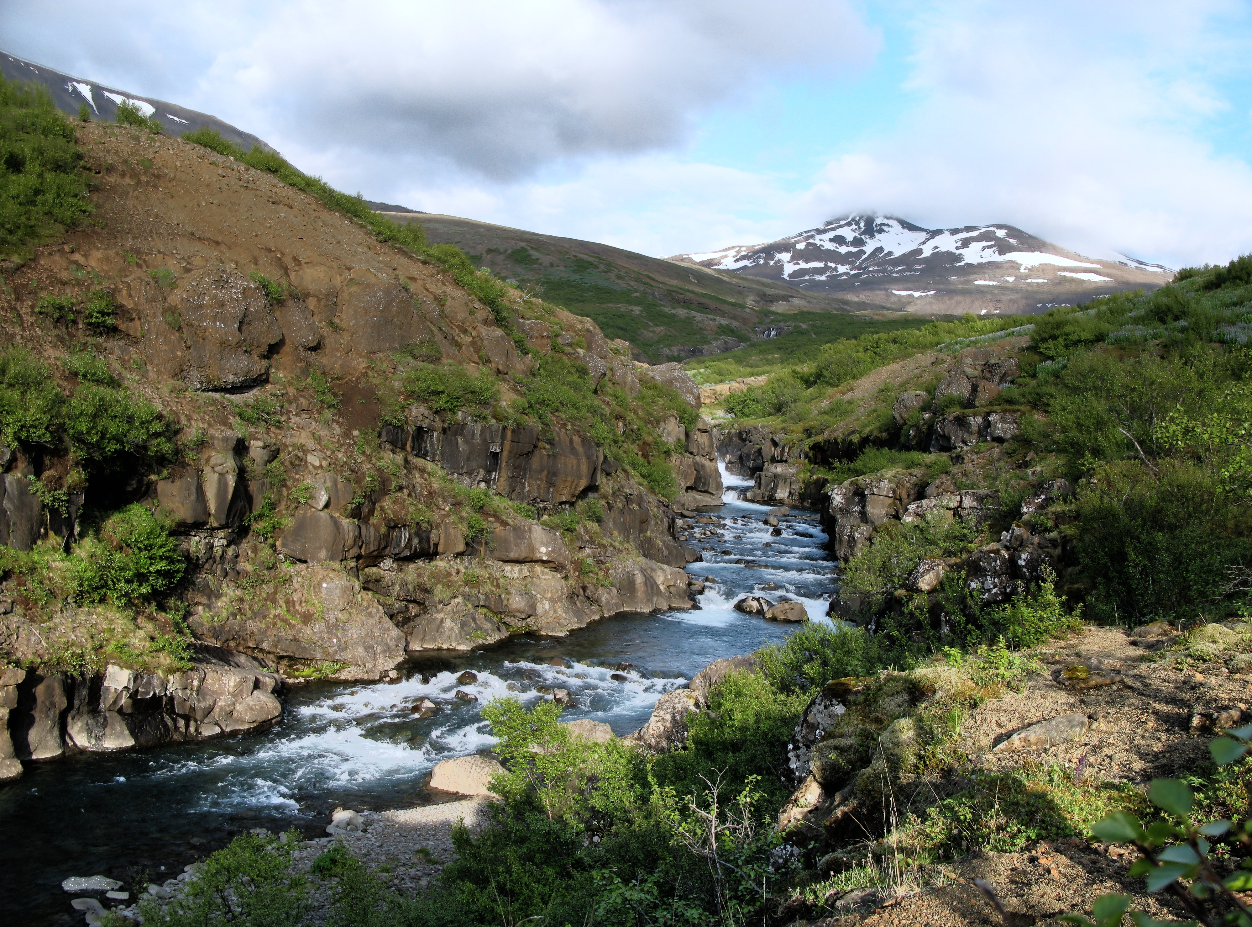 Fossinn Glymur er í Botnsá sem sjá má hér á myndinni. Botnsá rennur úr hinu þjóðsagnakennda Hvalvatni og til sjávar í botn Hvalfjarðar. Hvalvatn er talið annað dýpsta stöðuvatn landsins. The river Botnsá flows from the legendary lake Hvalvatn (whale-lake) into fjord Hvalfjörður (whale-fjord). Botnsá is the home to Glymur, the highest (196 m) waterfall in Iceland.